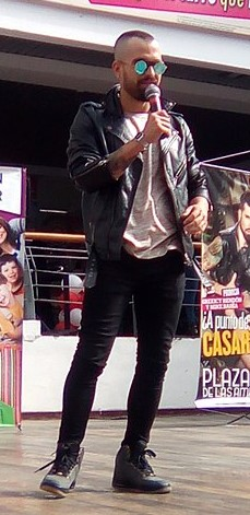 Mike Bahia en Plaza de las Americas.